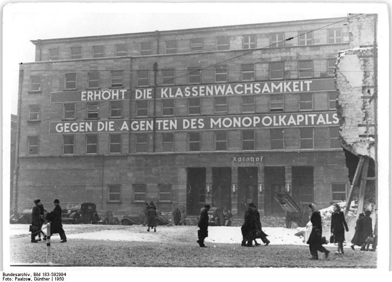 Zentralbild Illus-Paalzow. UBz: Transparent am Rathaus Halle a.-Saale ruft zur Wachsamkeit auf. 5286-50